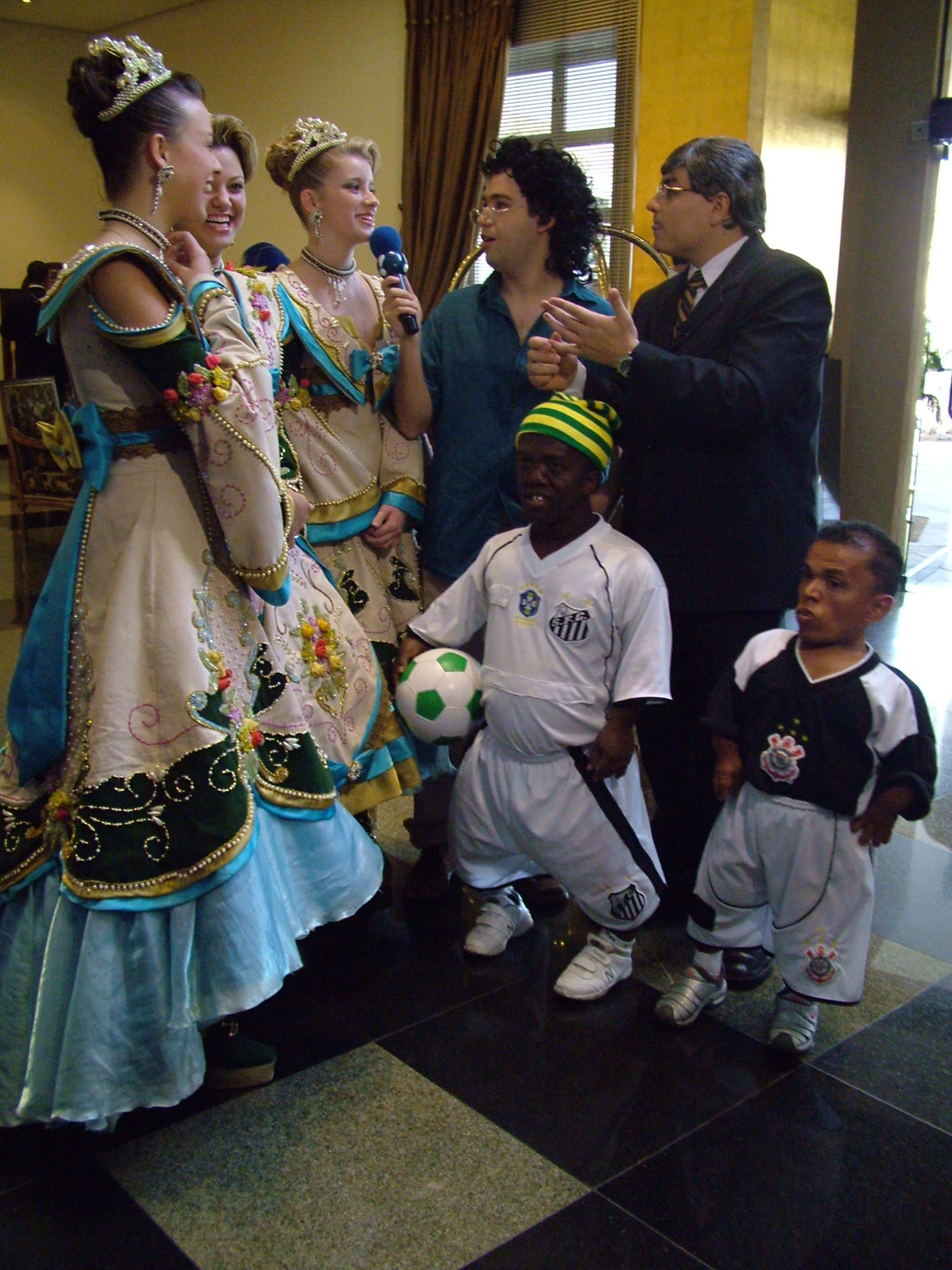 Carlos Alberto da Silva e sua personagem "Merchan Neves" do programa Pânico na TV.